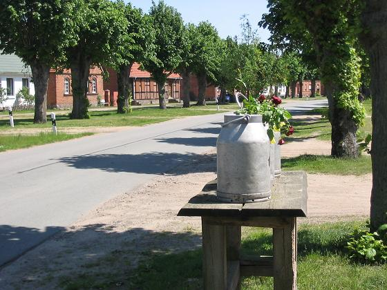 Stepenitz, Angerdorf in der Prignitz, Brandenburg fotografiert im Mai 2005 von Lienhard Schulz